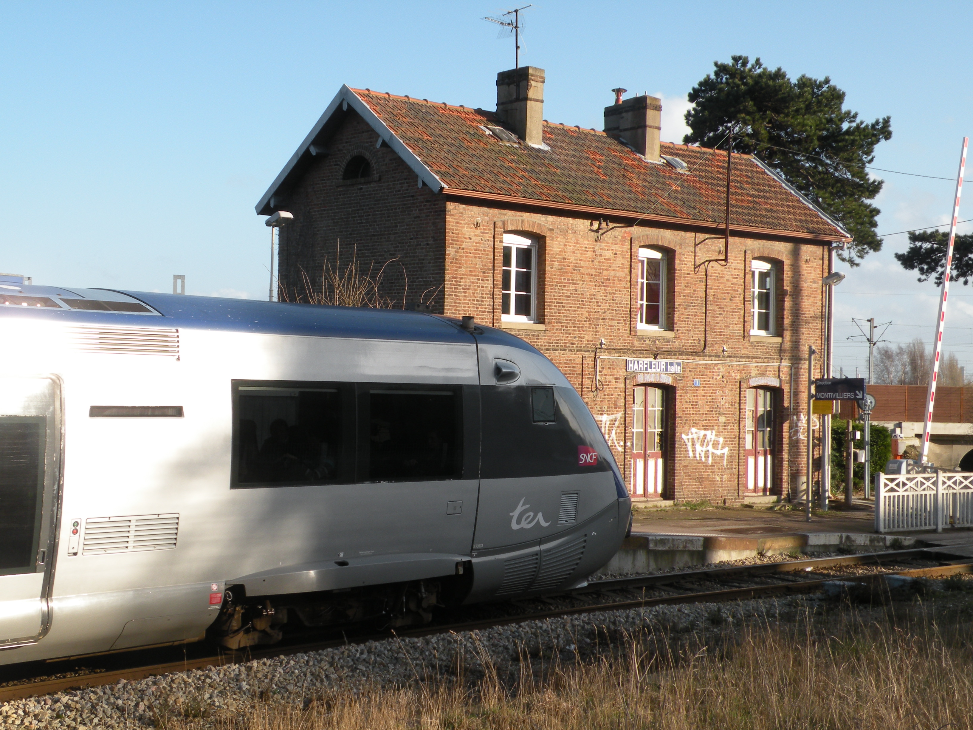 Un Autorail X 73500 dans la halte d'Harfleur.